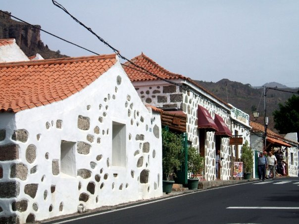 Fataga